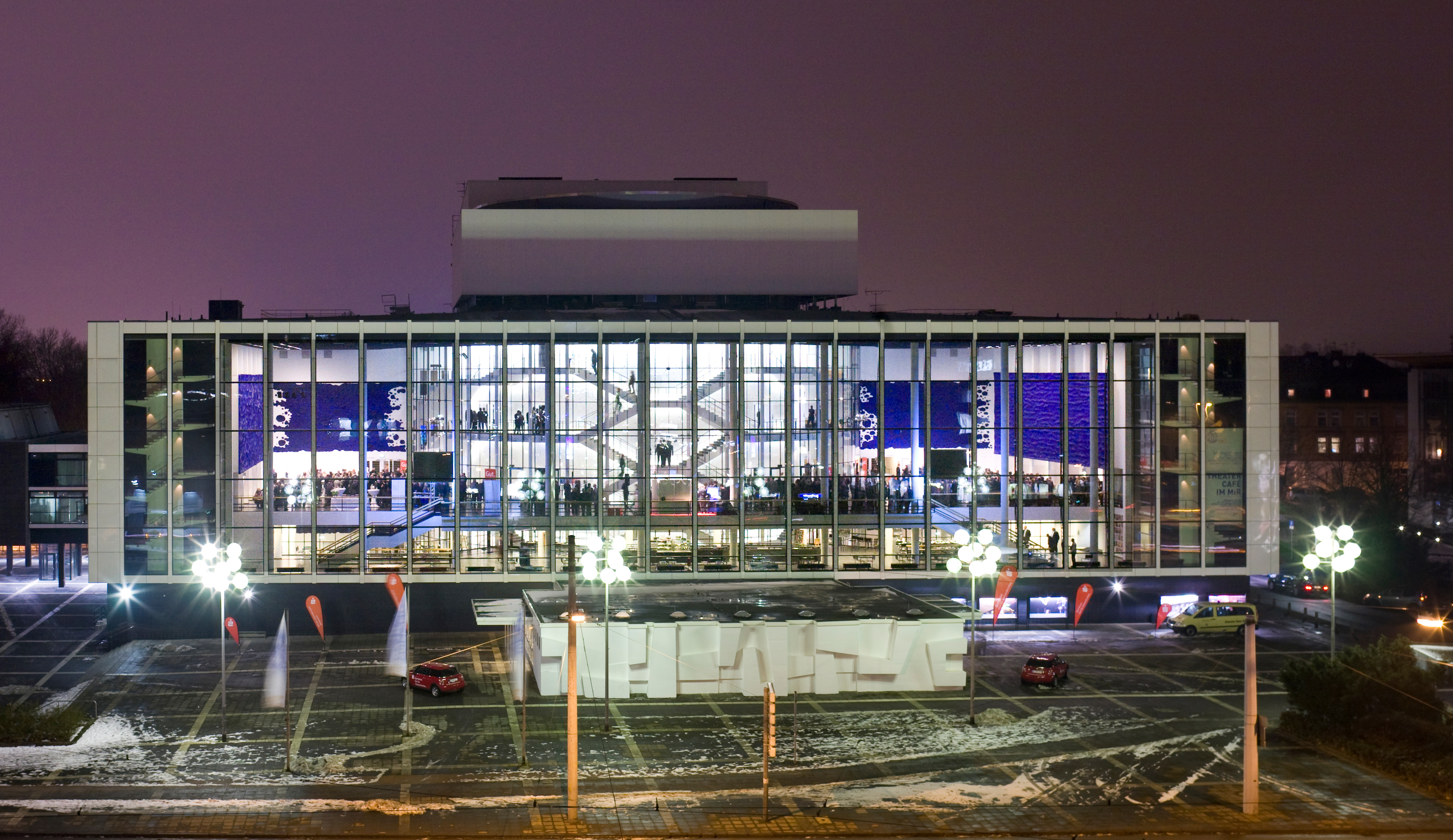 MiR. Glasfassade.